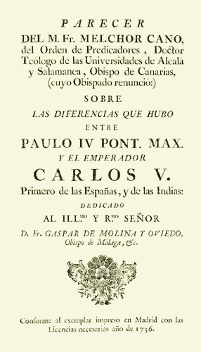 Parecer del M. fr.Melchor Cano, del Orden de Predicadores, Doctor Teólogo de las Universidades de Alcalá y Salamanca, Obispo de Canarias (cuyo Obispado renunció) sobre las diferencias que hubo entre Paulo IV Pont. max. Y el emperador Carlos V. Primero de las Españas, y de las Indias: Dedicado al Ilmo. y Rmo. Señor D. fr. Gaspar de Molina y Oviedo, Obispo de Málaga., &c. Conforme al exemplar impreso en Madrid con las Licencias necesarias año de 1736. Texto original: Valladolid, 15 de noviembre de 1555.